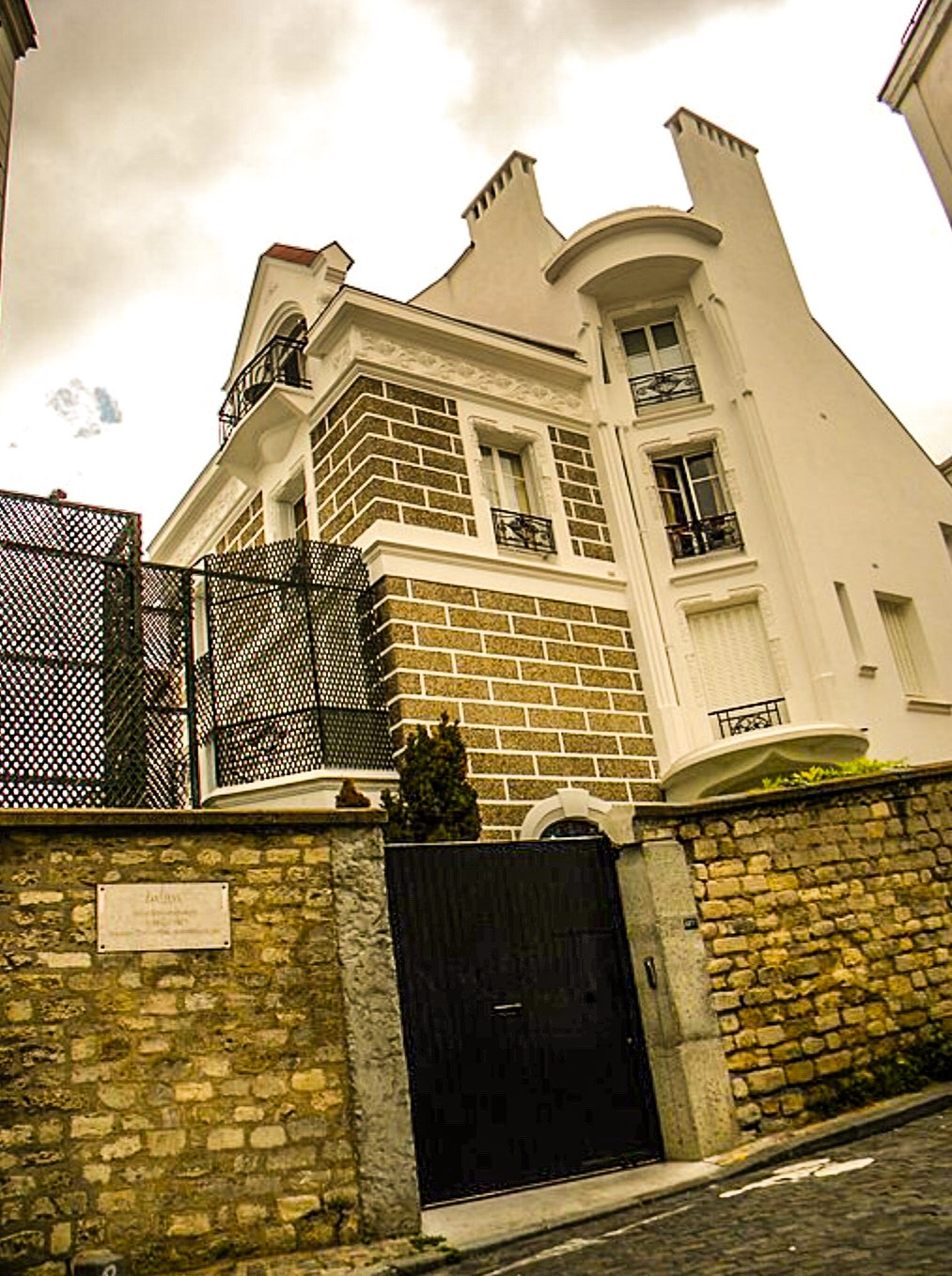 La maison de Dalida in Rue de d'Orchampt, Bute Montmartre (Paris)